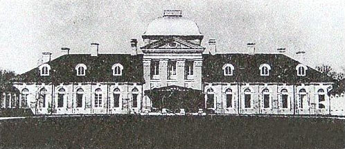 Беларуская (тарашкевіца): Шчорсы (Ščorsy), сядзіба Храптовічаў (Chraptovič)